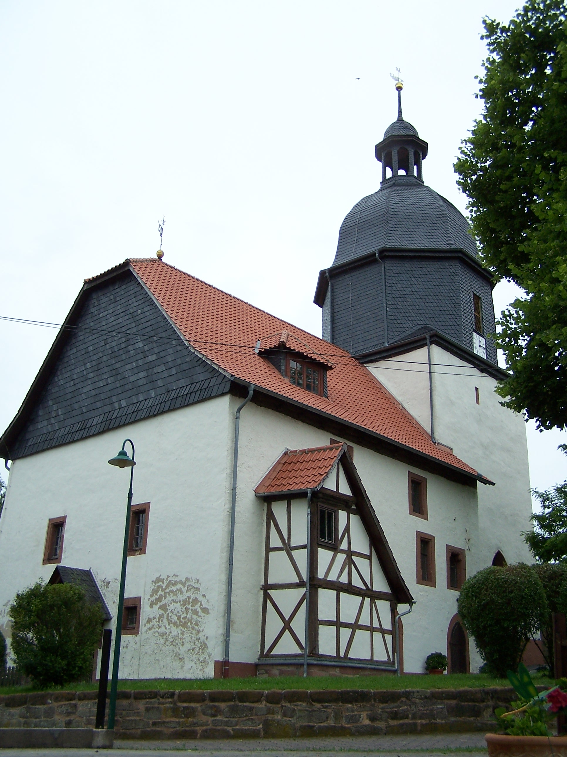 Ansicht von Südwesten.